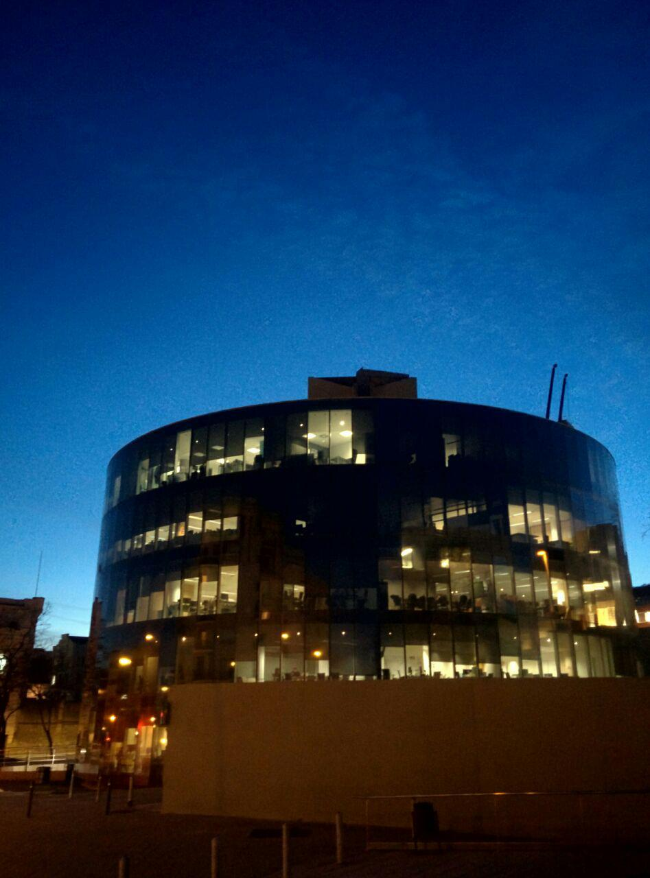 ساختمان نکسوس ۱